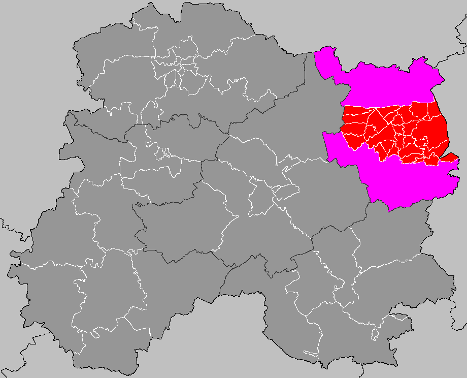 Localisation du canton de Sainte-Menehould